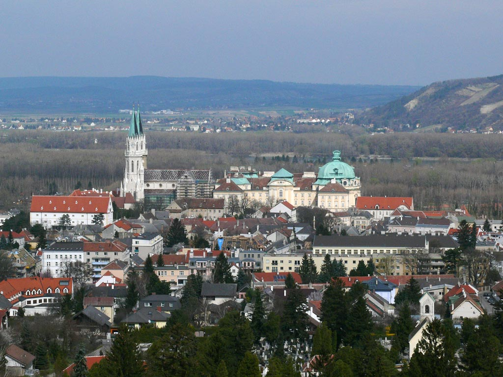 Klosterneuburg, view